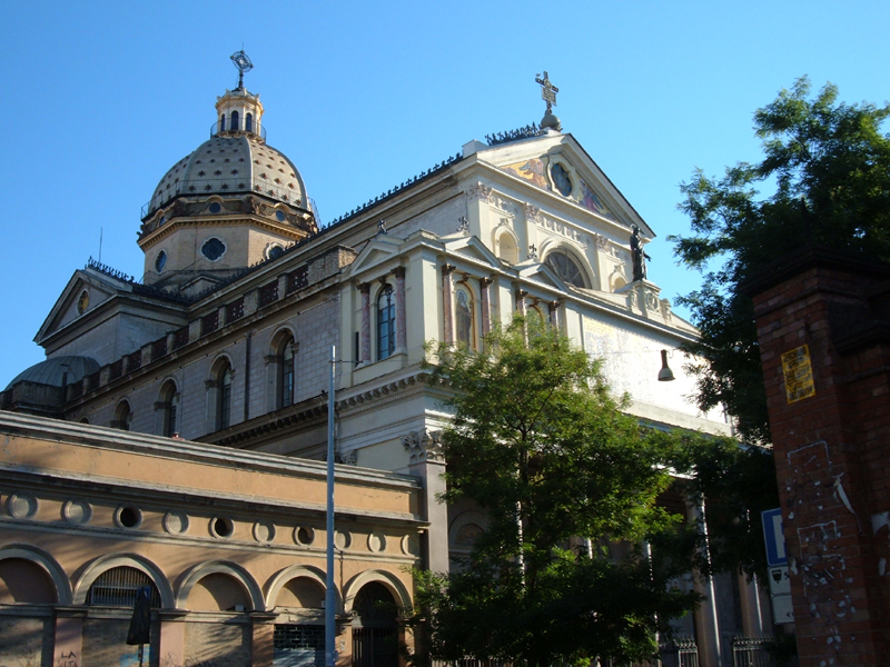 La chiesa di San Gioacchino in Prati, nel rione Prati, a Roma. Foto personale.